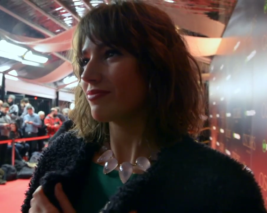 Corbero